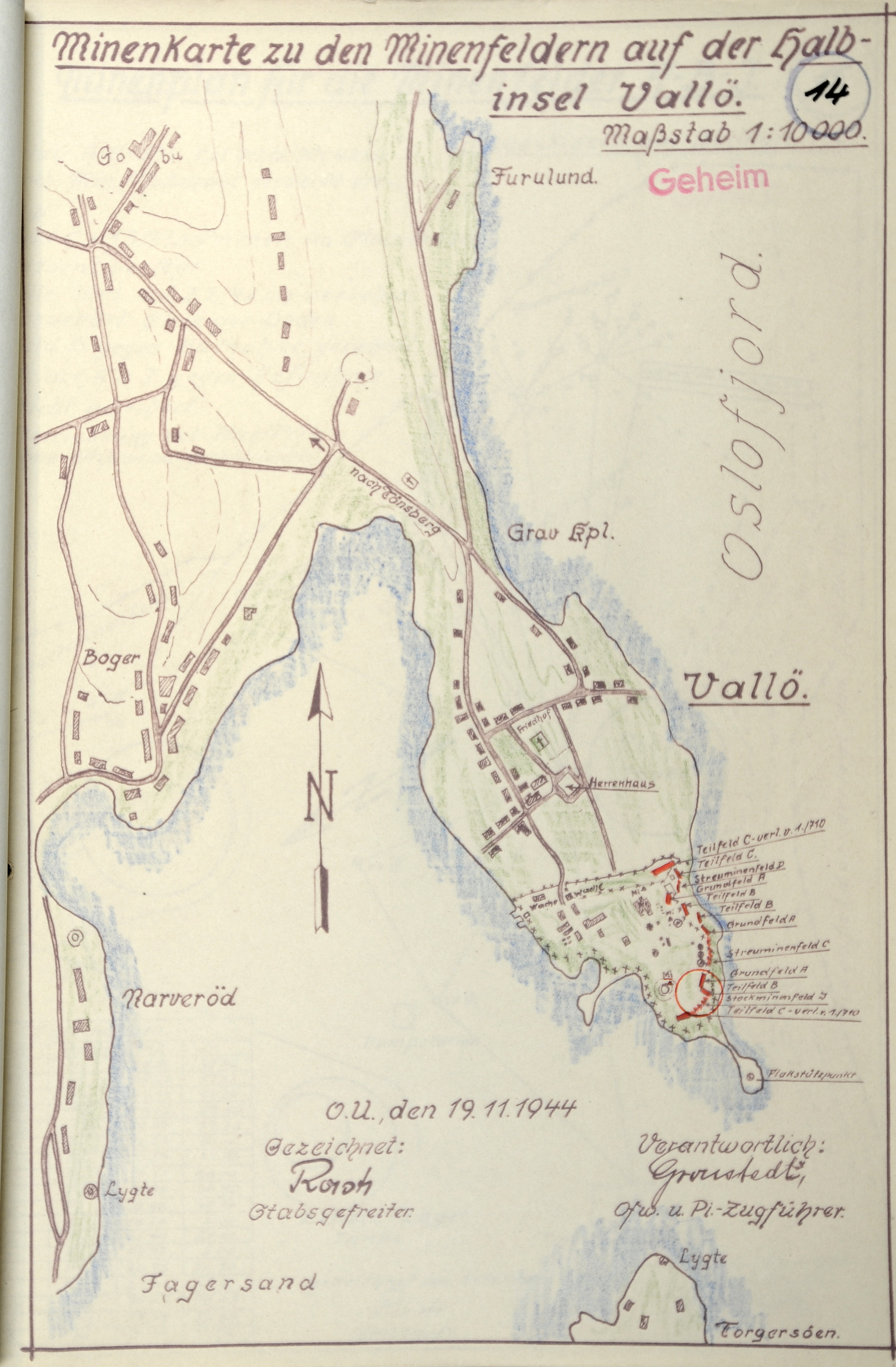 Minekart over Vallø med inntegnet bunkere og forsvarsstillinger.